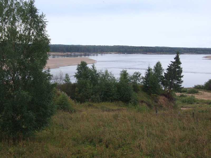 Вид на реку Вычегду из окна церкви Воскресения Христова